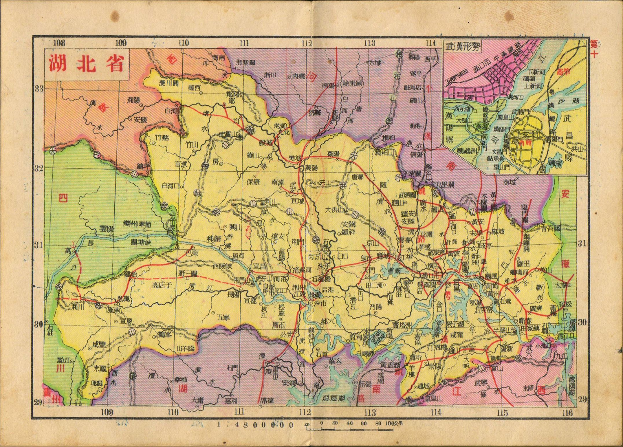 亚新地学社1936年《袖珍中华全图》湖北省